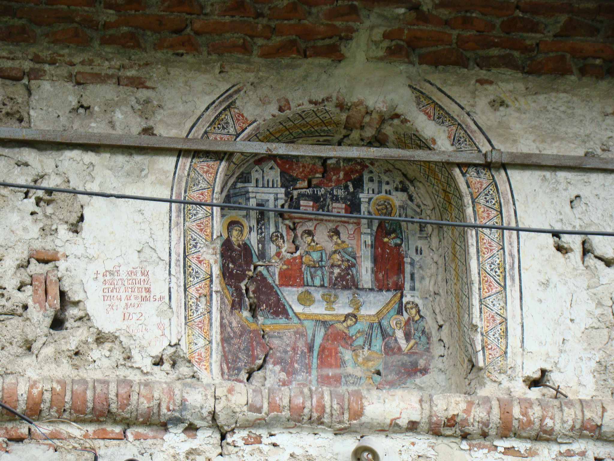 Biserica „Nașterea Maicii Domnului” a fostului schit Țigănia (Schitul Păr) sat Bistrița; comuna Costești- La E de sat și de Mănăstirea Bistrița